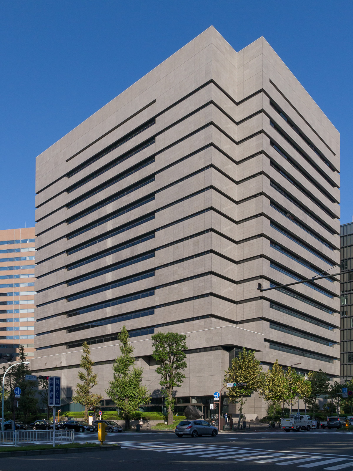 特許庁、東京都千代田区霞が関。